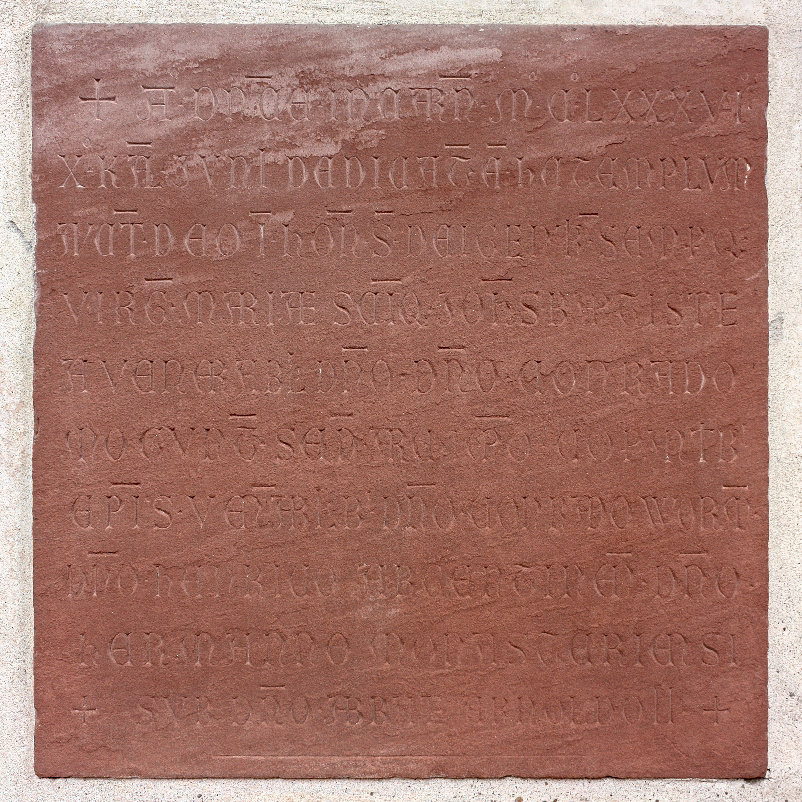 Weiheinschrift der Basilika des Klosters Eberbach